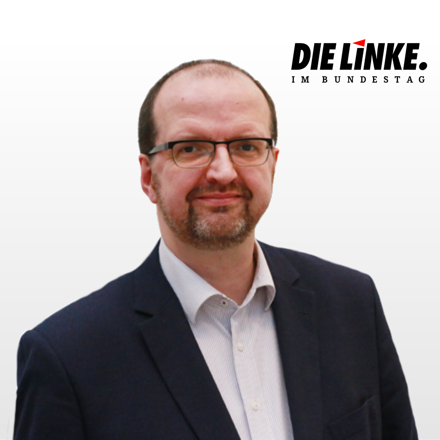 Thomas Lutze (MdB DIE LINKE)